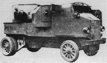 Российский бронеавтомобиль «Гарфорд-Путилов» «Уралец» морской модификации